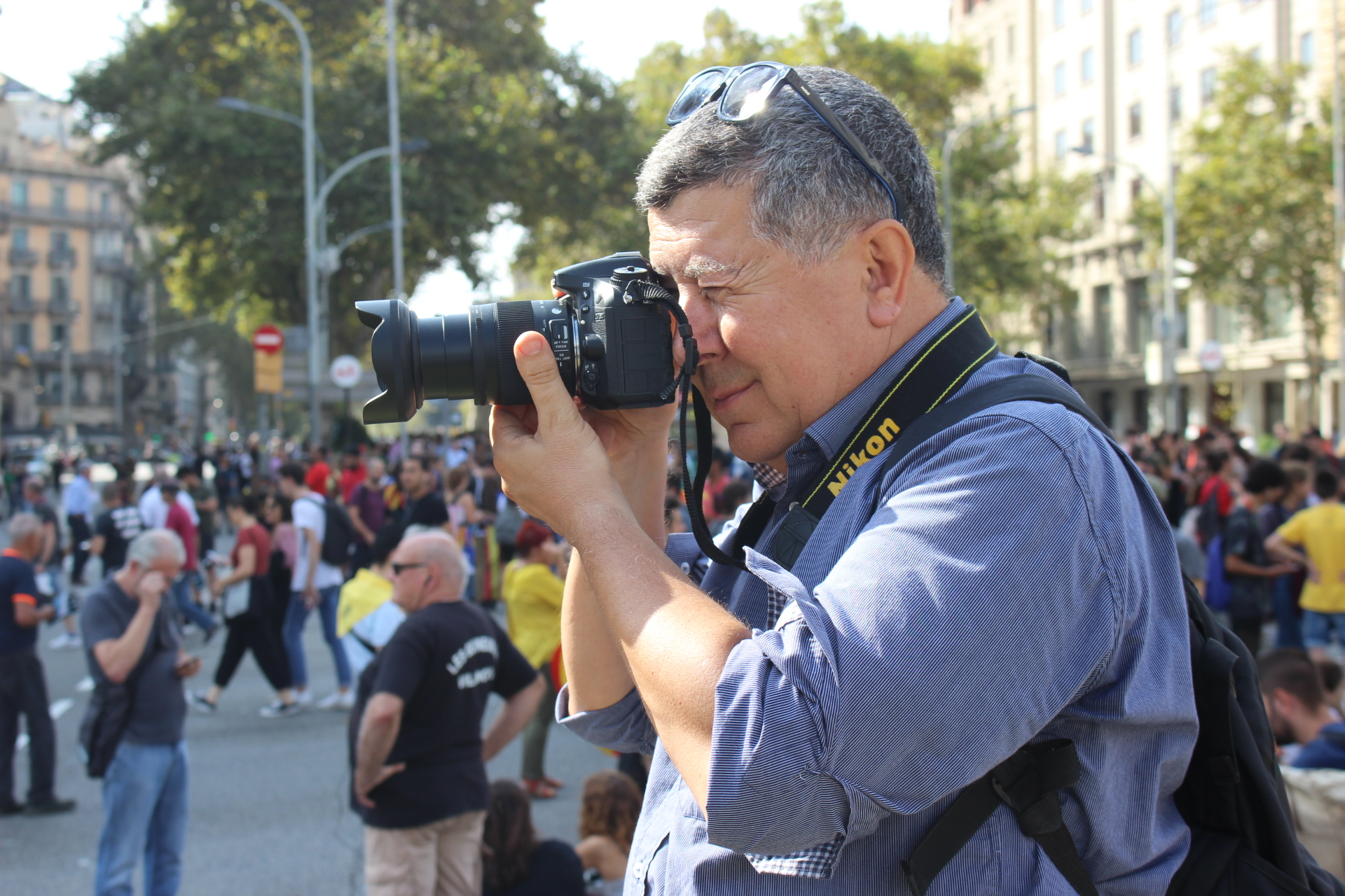 Xavier Rius Sant és un periodista freelance i escriptor català, especialitzat en temàtiques de drets humans, conflictes internacionals, món àrab, immigració, ultradreta i terrorisme.